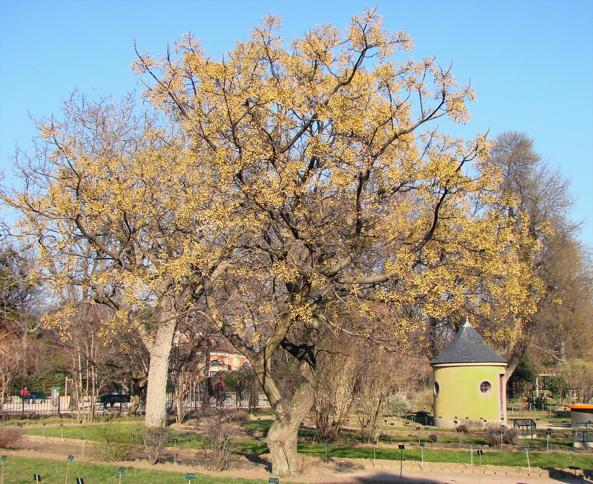 Melia azedarach, photographie prise le 17-02-2008 au Jardin des Plantes à Paris.